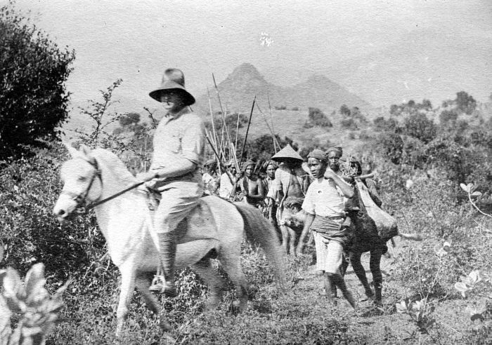 Repronegatief. Assistent Resident van Soembawa aan het hoofd van een stoet met jachtbuit